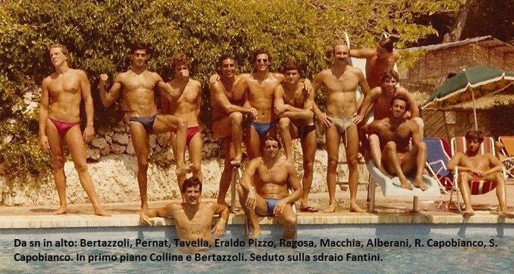 La squadra italiana di pallanuoto Fiat Sisport Ricambi Torino a fine anni 70 del XX secolo.